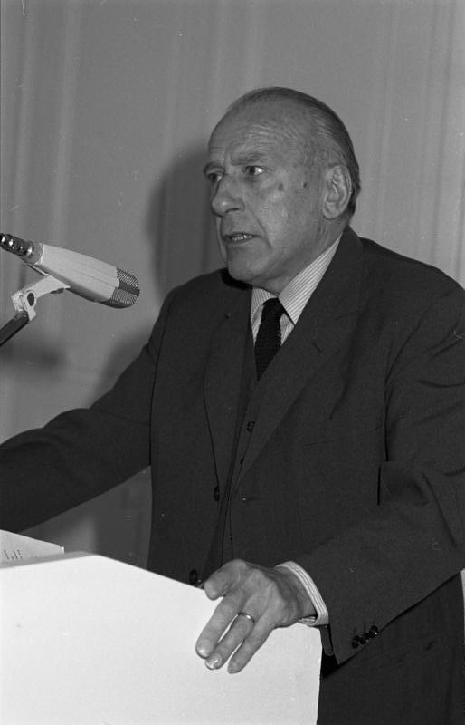 Übergabe des Ludwig-Erhard-Preises für Wirtschaftspublizistik an Dr. Ernst Günter Vetter in der Redoute.